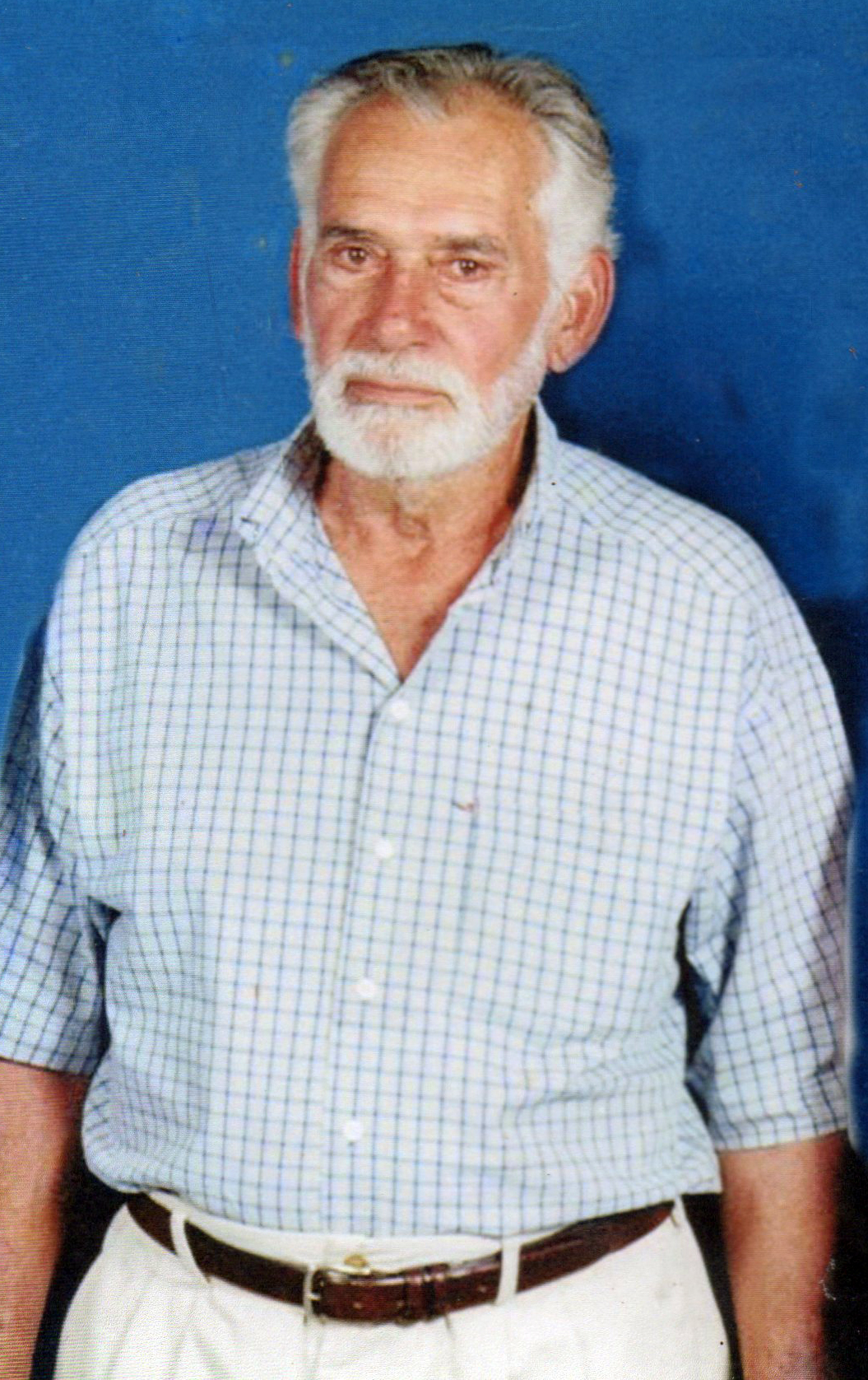 Sr. José Joaquim de Azevedo Figueiredo, fundador de Figueirópolis d'Oeste.